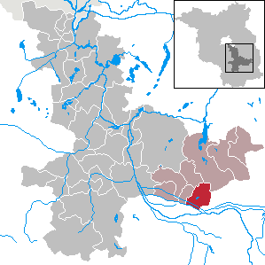 Byhleguhre-Byhlen in Brandenburg (Country) - District Dahme-Spreewald